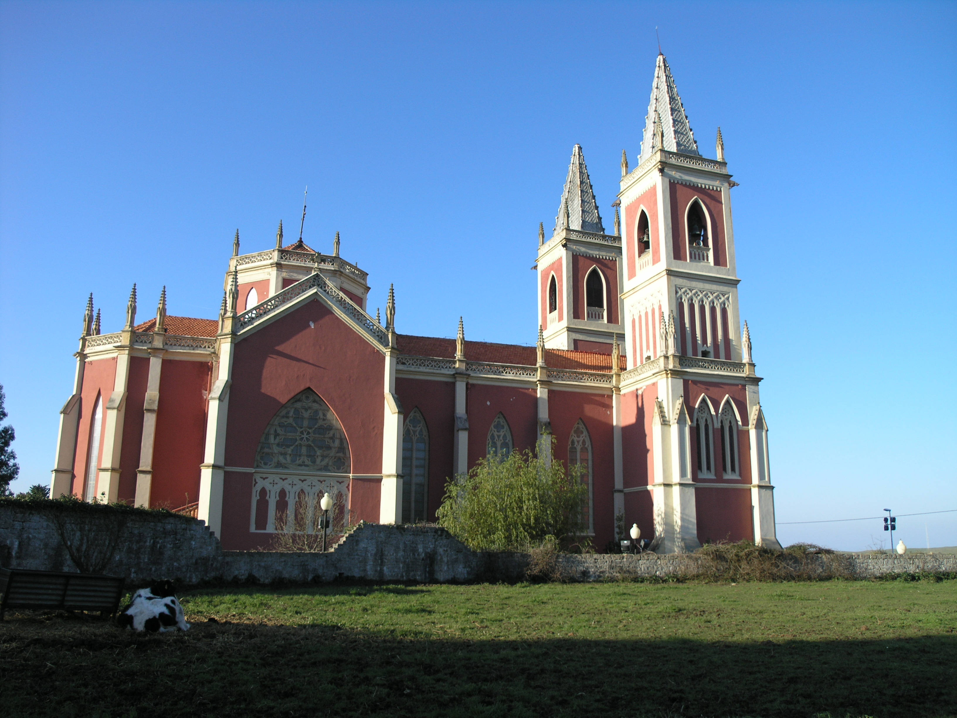 Iglesia de San Pedro ad Vincula (1891-1910) en Cóbreces, Alfoz de Lloredo, Cantabria, España. Arquitecto: Emilio de la Torriente. Estilo neogótico.